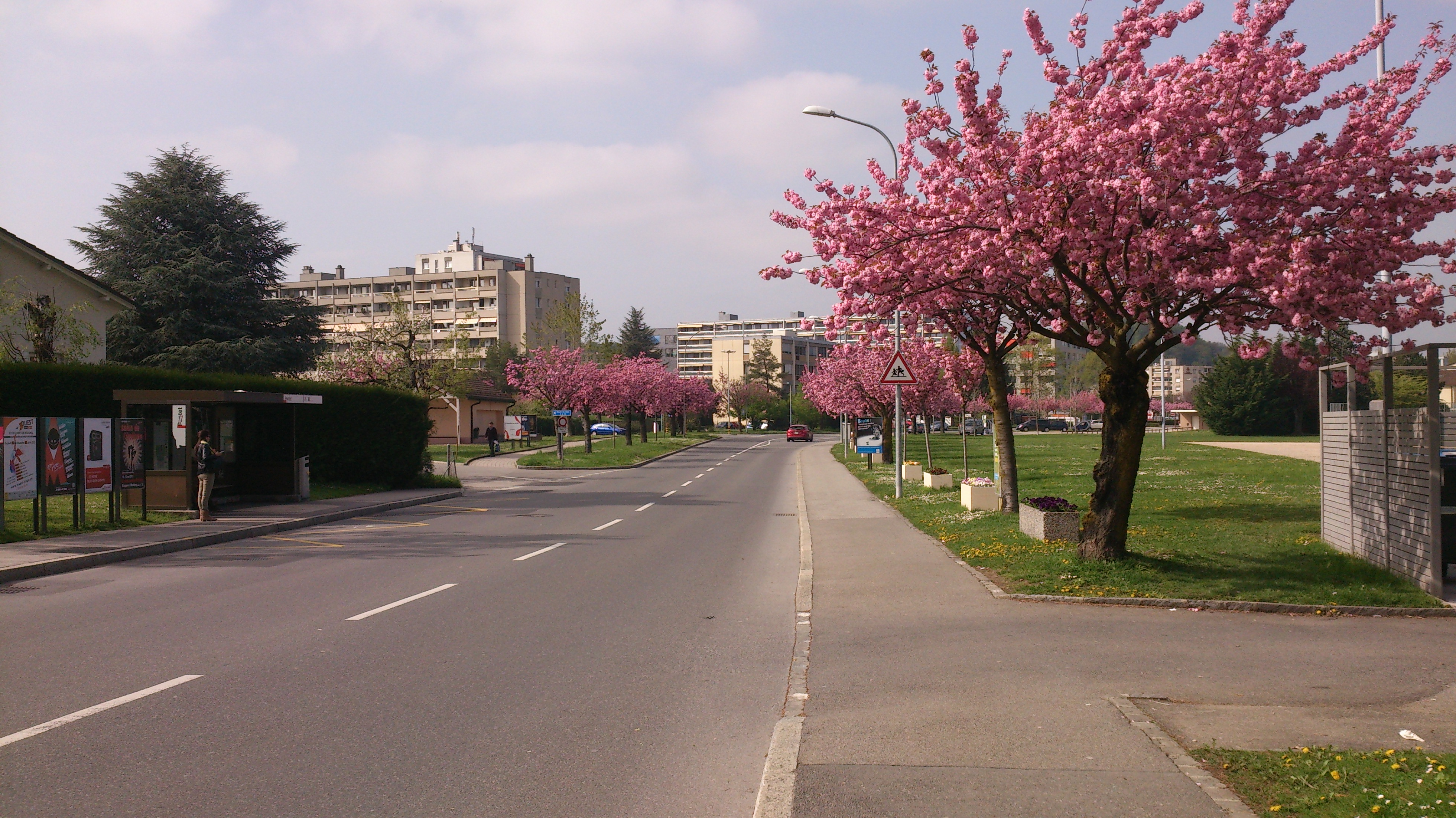 Ecublens